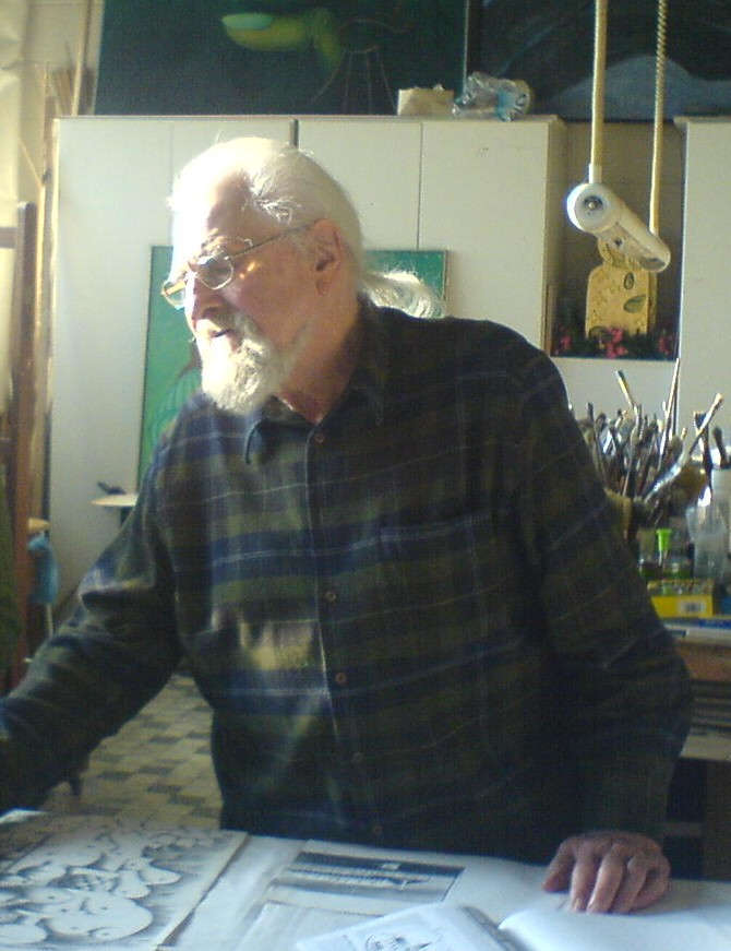 Hanns Joachim Klug, Maler und Plastiker, im Atelier in Hannover, März 2009